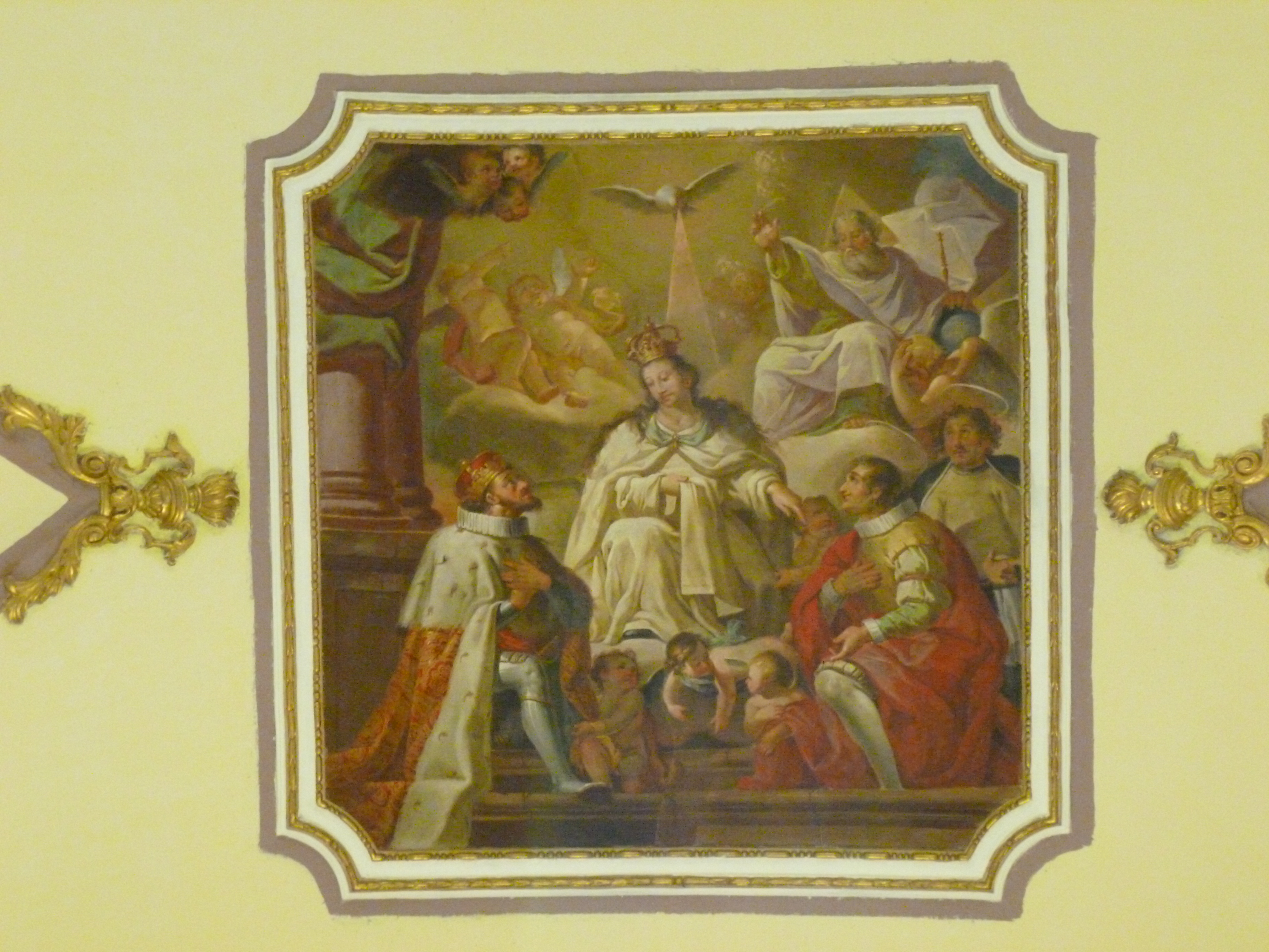 Aparició de la Mare de Déu davant Sant Pere Nolasc, Sant Ramon de Penyafort i Jaume I (1804), de Joaquim Oliet i Cruella. Fresc a la volta del transsepte de l'església de Sant Bartomeu de Torreblanca, Plana Alta (País Valencià) 05.117-002.